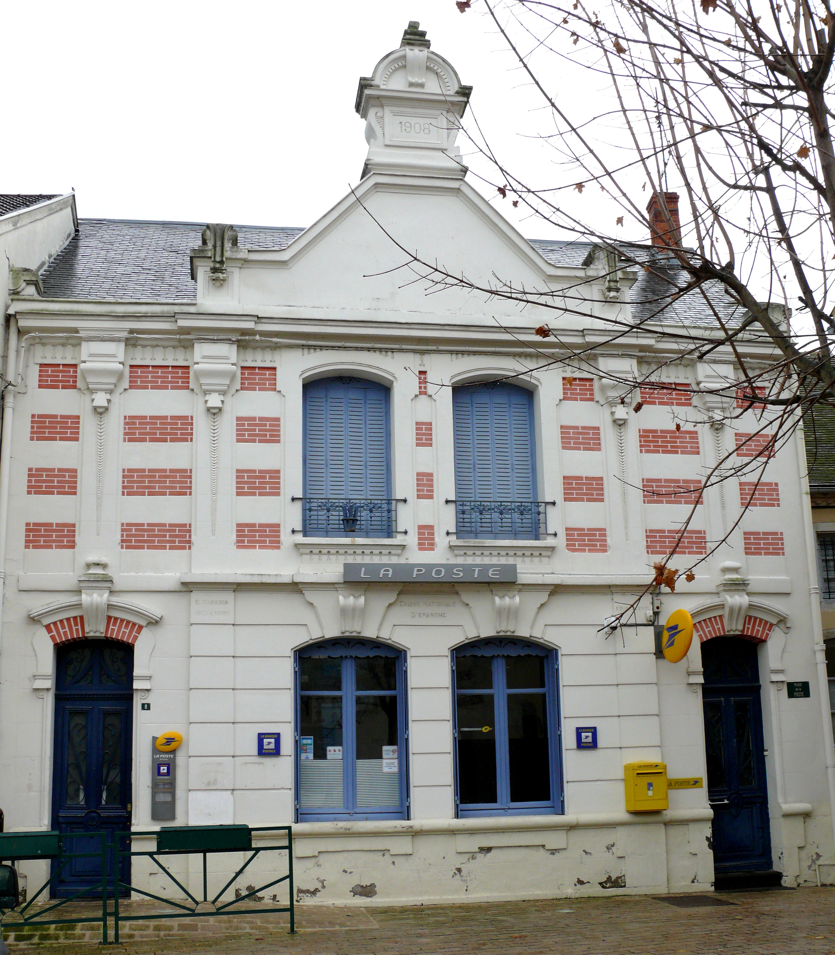 Bellenaves - La Poste, caisse d'épargne (1908)